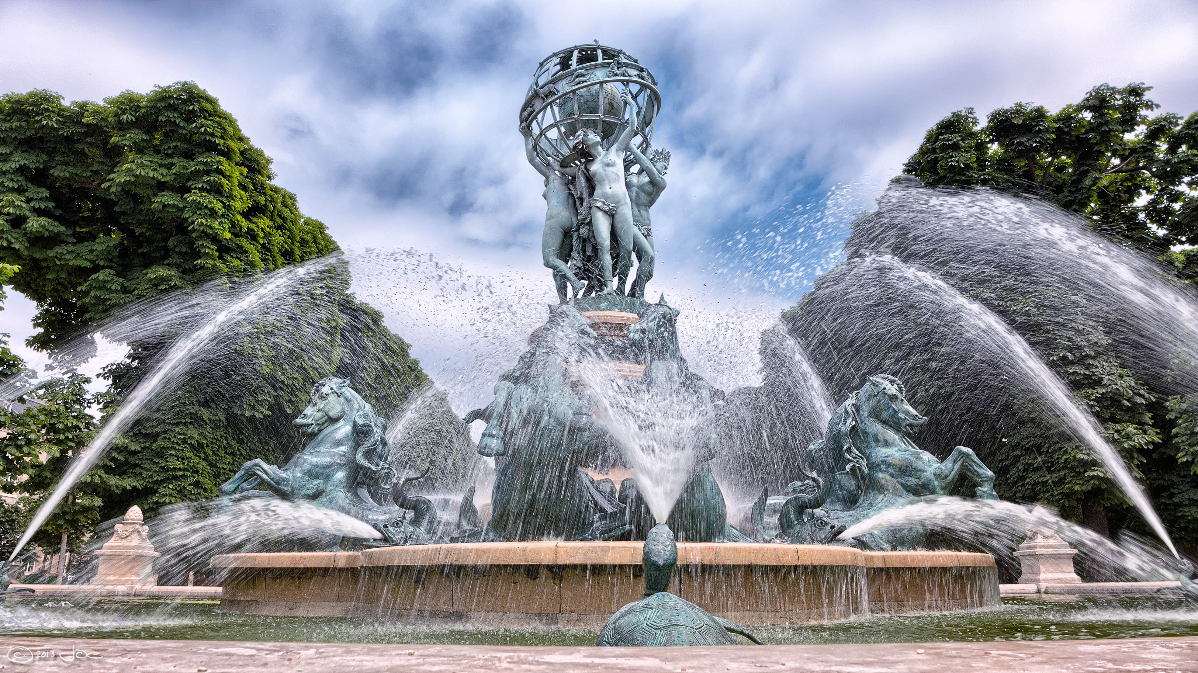 Fontaine de l'Observatoire, Paris.